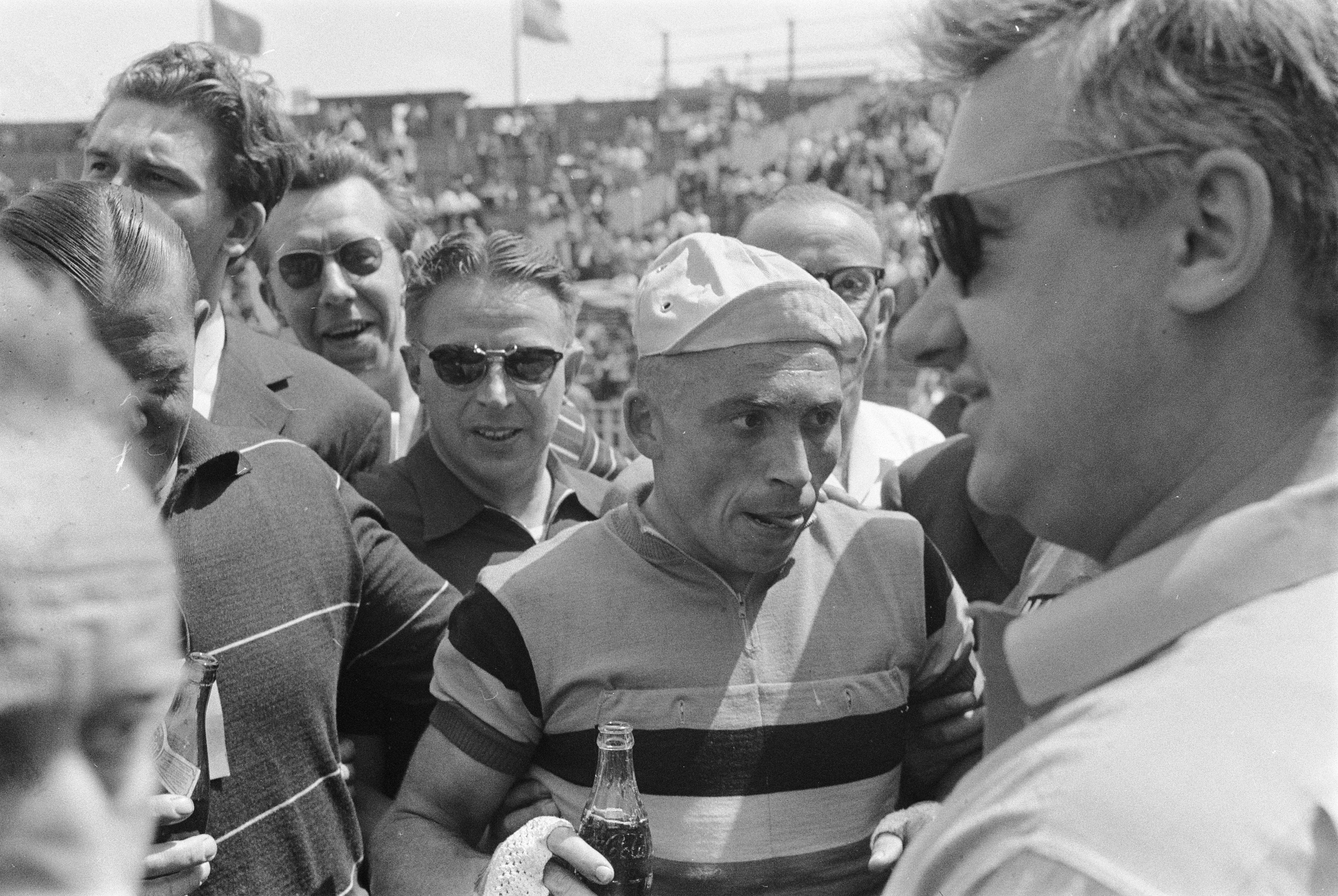 Collectie / Archief : Fotocollectie Anefo Reportage / Serie : [ onbekend ] Beschrijving : Tour de France Datum : 26 juni 1960 Instellingsnaam : Tour de France Fotograaf : Pot, Harry / Anefo Auteursrechthebbende : Nationaal Archief Materiaalsoort : Negatief (zwart/wit) Nummer archiefinventaris : bekijk toegang 2.24.01.05 Bestanddeelnummer : 911-3694